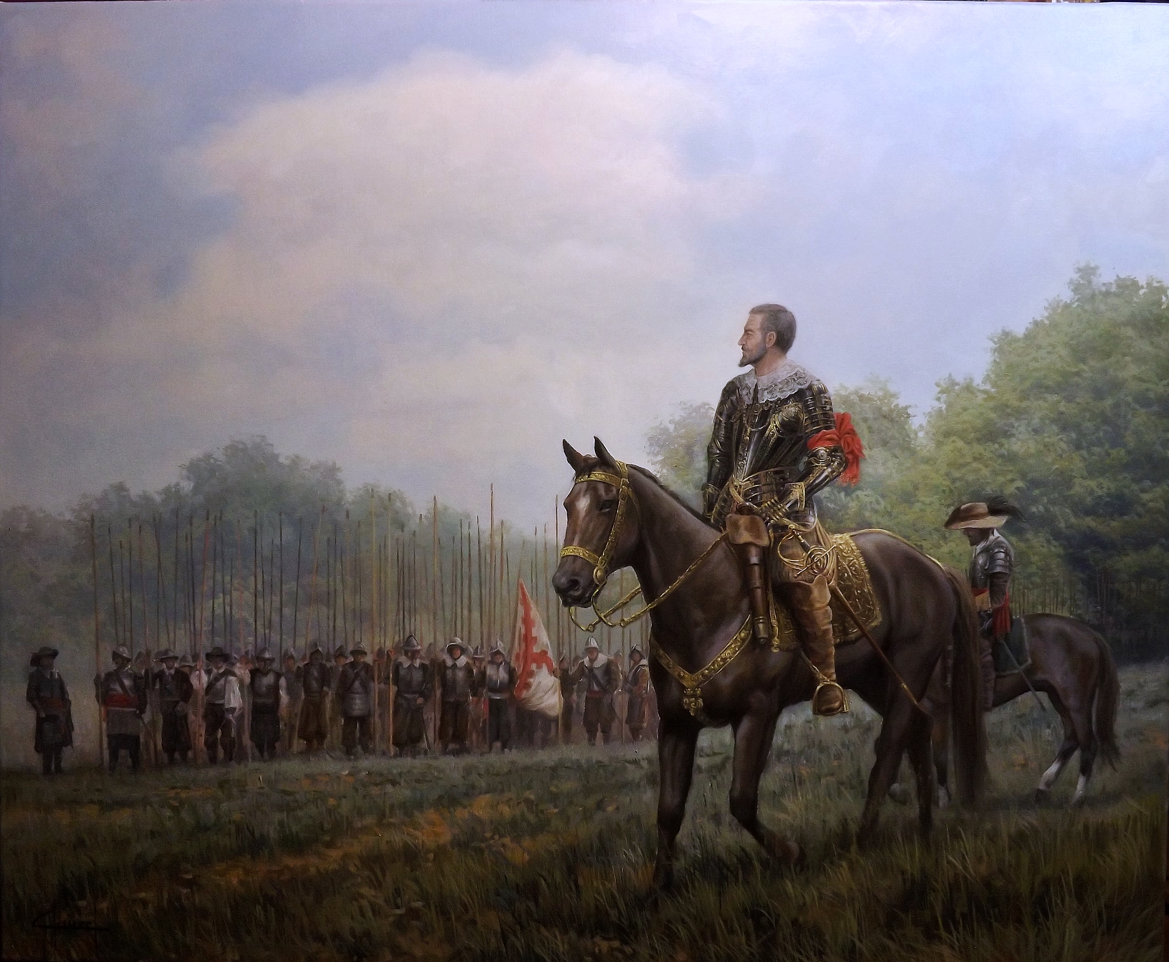 La victoria de Breda, por Jose Ferre Clauzel (2016)